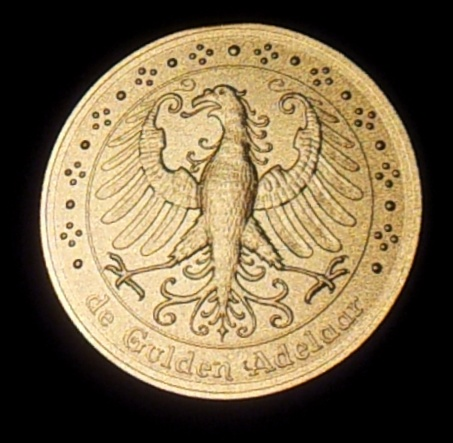 Medaille culturele prijs van de gemeente Deventer